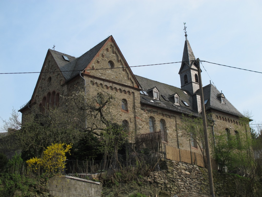 Niederreifenberg, ehem. katholische Kirche (1898, 1906)